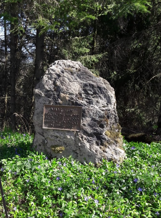 Im Jahr 1972 entdecktes Hügelgrab in der Nähe der Lausebuche im Grenzbereich Elspe/Oberelspe. Geschätztes Alter ca. 4000 Jahre